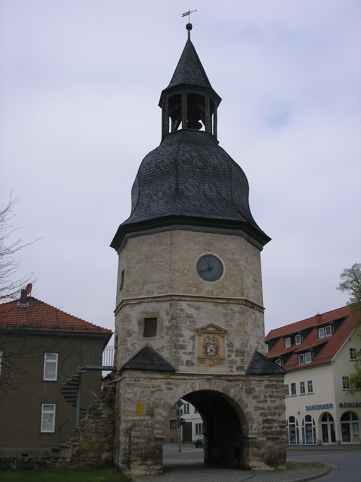 Das Osterhöfer Tor der Stadtbefestigung in Bad Tennstedt (Thüringen).